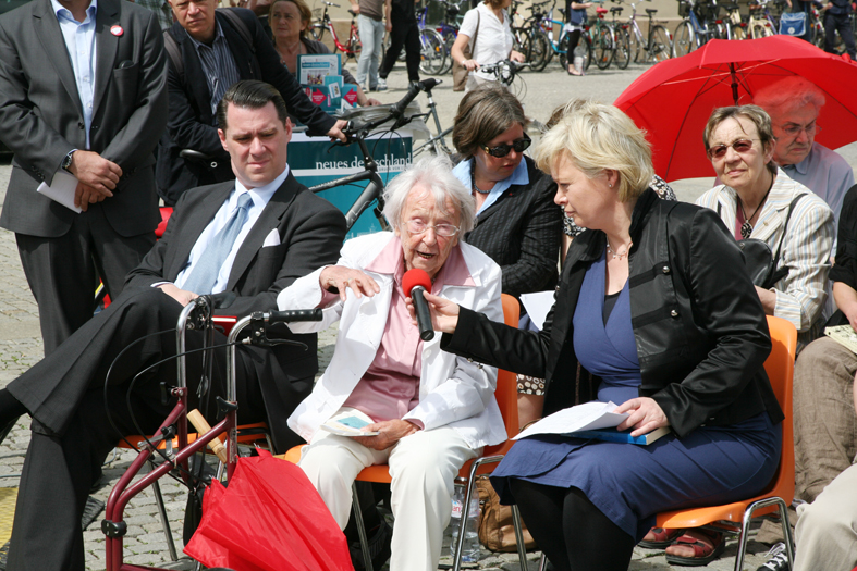 Die Bundestagsfraktion DIE LINKE lud auch in diesem Jahr zum Lesen gegen das Vergessen auf den Berliner Bebelplatz. Damit soll an die Bücherverbrennung von 1933 und den Umgang der Nationalsozialisten mit Andersdenkenden erinnert werden. Die Schriftstellerin Elfriede Brüning (102) erzählt.